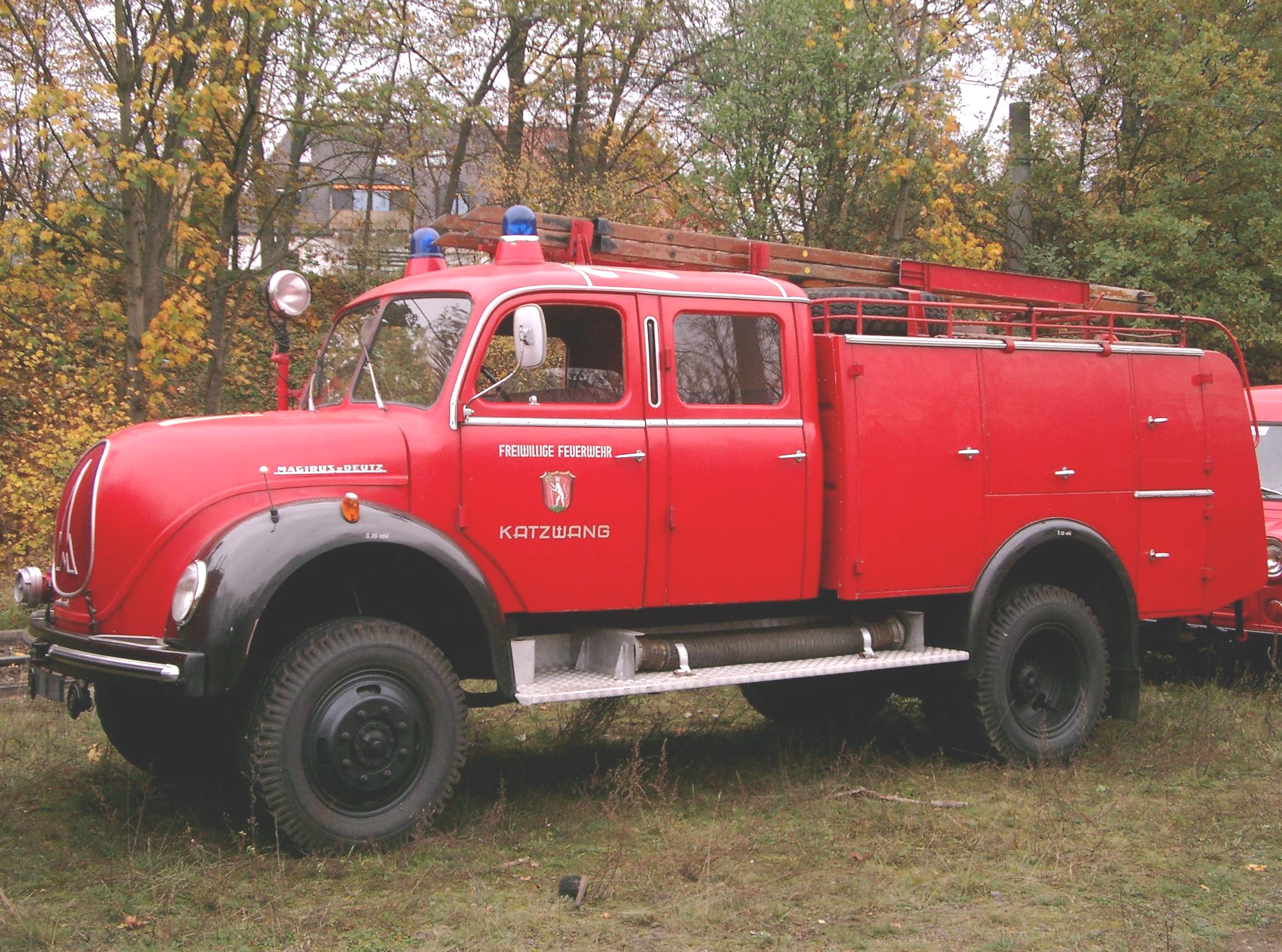 Tanklöschfahrzeug TLF 16 (ehemals Freiwillige Feuerwehr Katzwang)